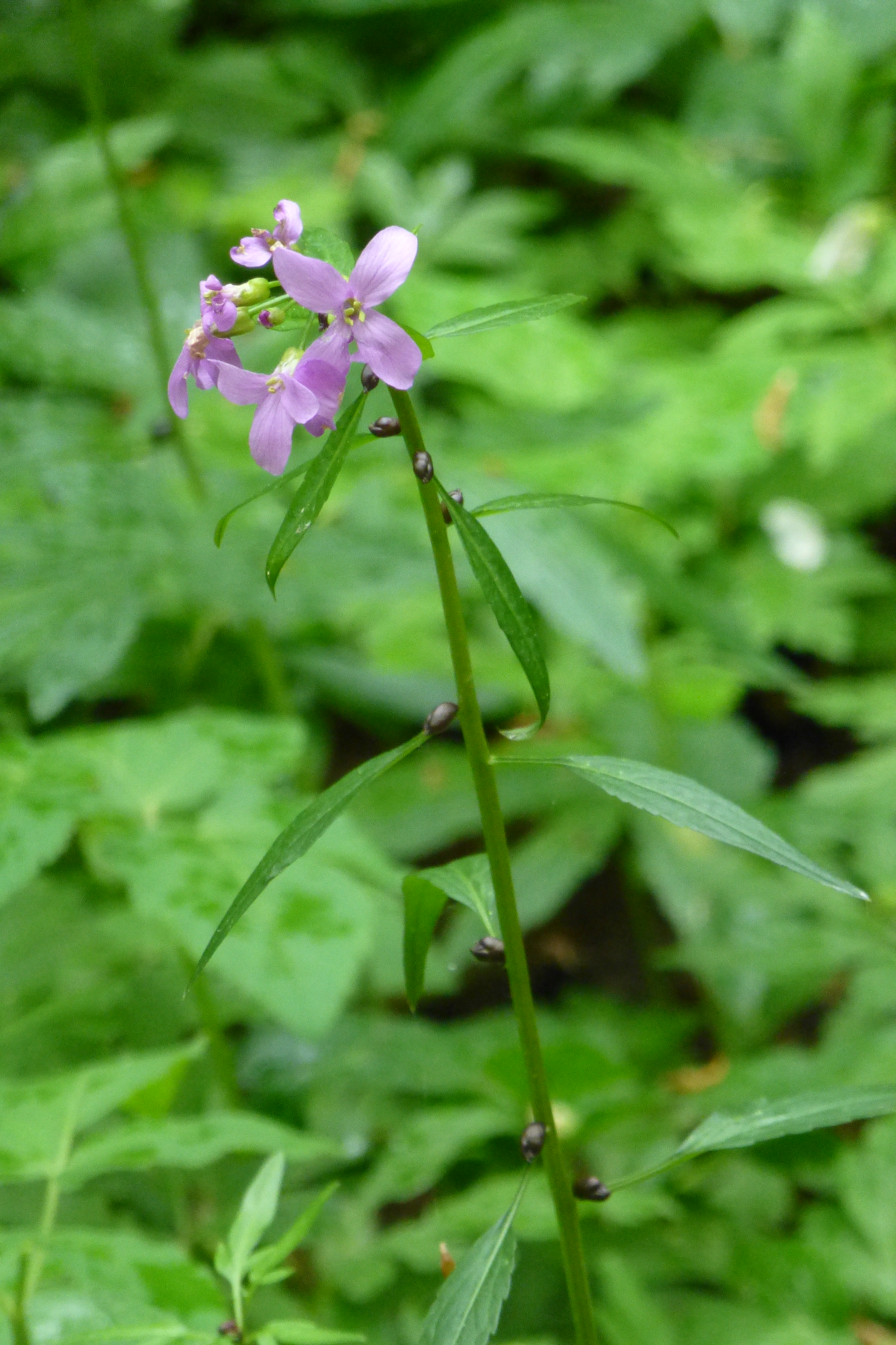 Zwiebel-Zahnwurz im Göttinger Wald